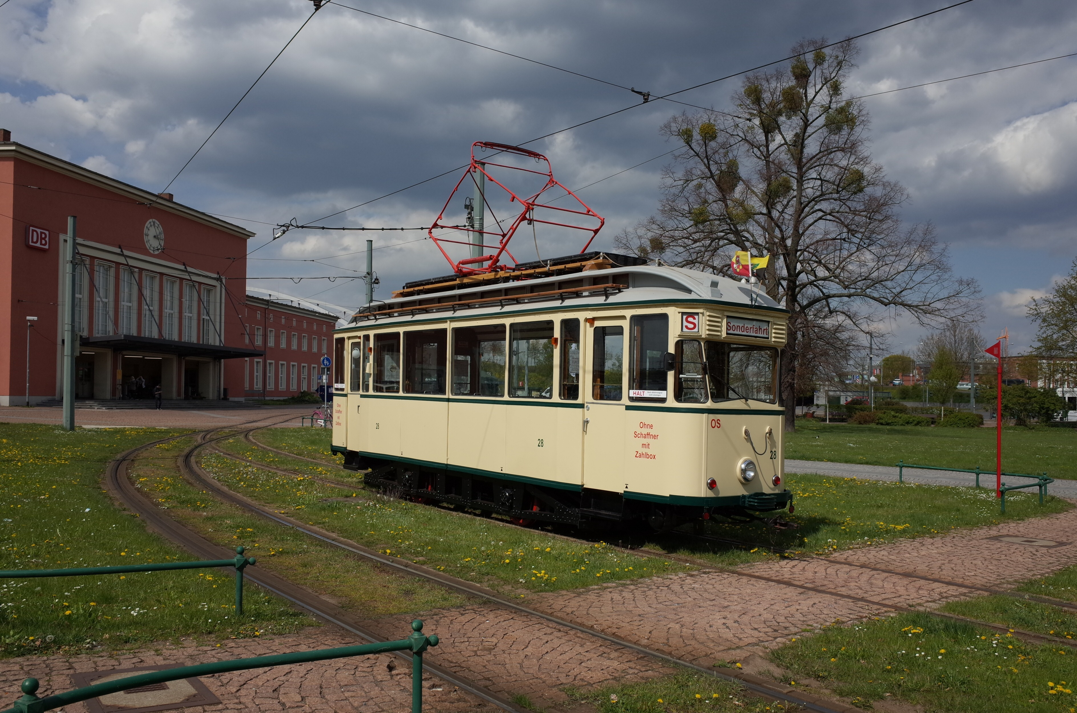 Dessau-Roßlau, Der Straßenbahntriebwagen 28 am Hauptbahnhof. Beschreibung auf der Homepage der Stadtwerke Dessau: Der Straßenbahntriebwagen 28 (TW 28) aus dem Baujahr 1925 (Sächsischen Waggonfabrik Werdau) wurde 1987 als „Traditionswagen“ aus Leipzig übernommen und erst vor kurzem aufwendig restauriert. Der Pullman-Wagen bietet bis zu 50 Personen Platz, davon 20 Sitzplätze mit hochwertiger Ledergarnitur und Tischen.[1]